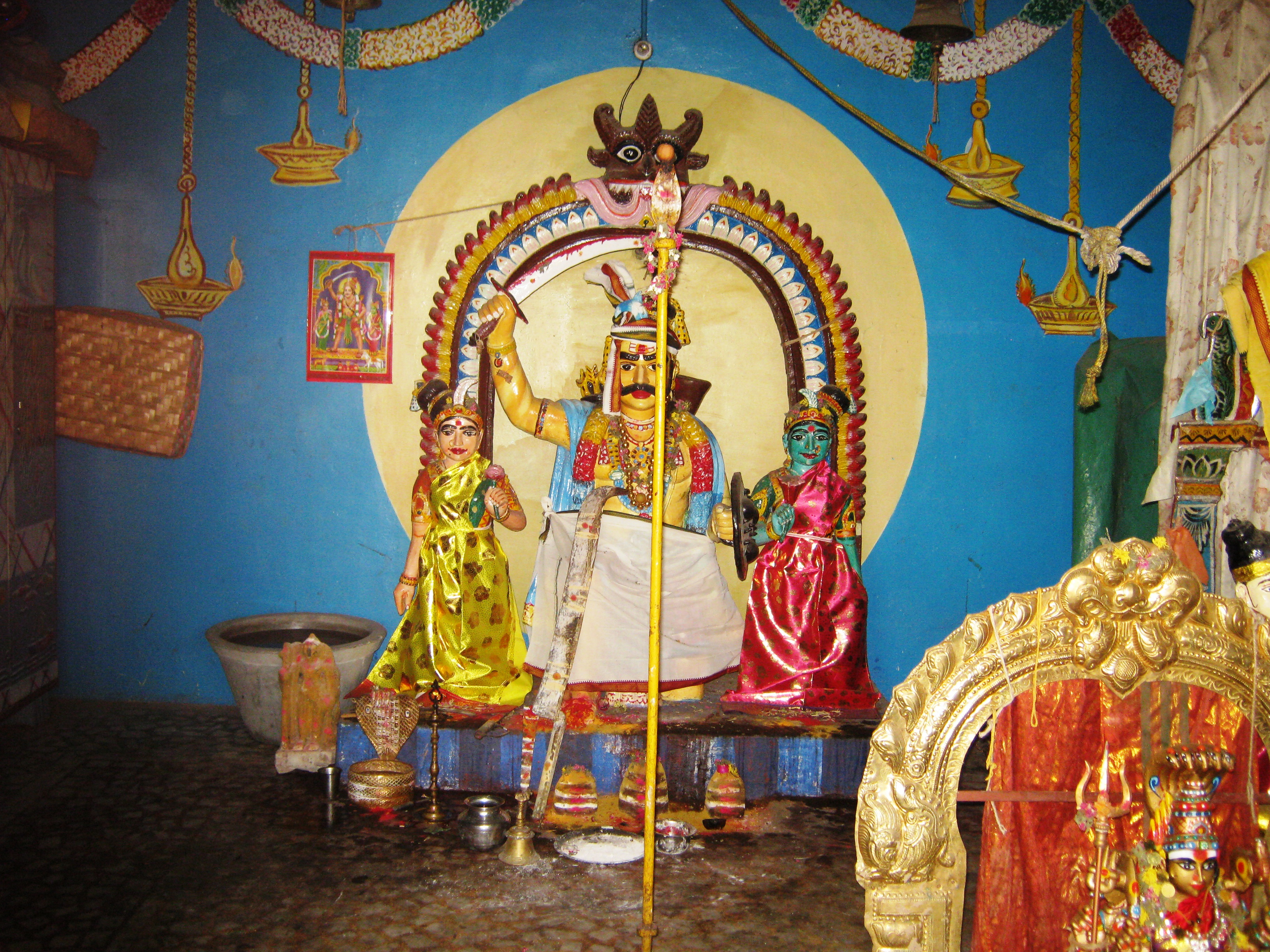 SRI MADURAI VEERAN TEMPLE, SALEM